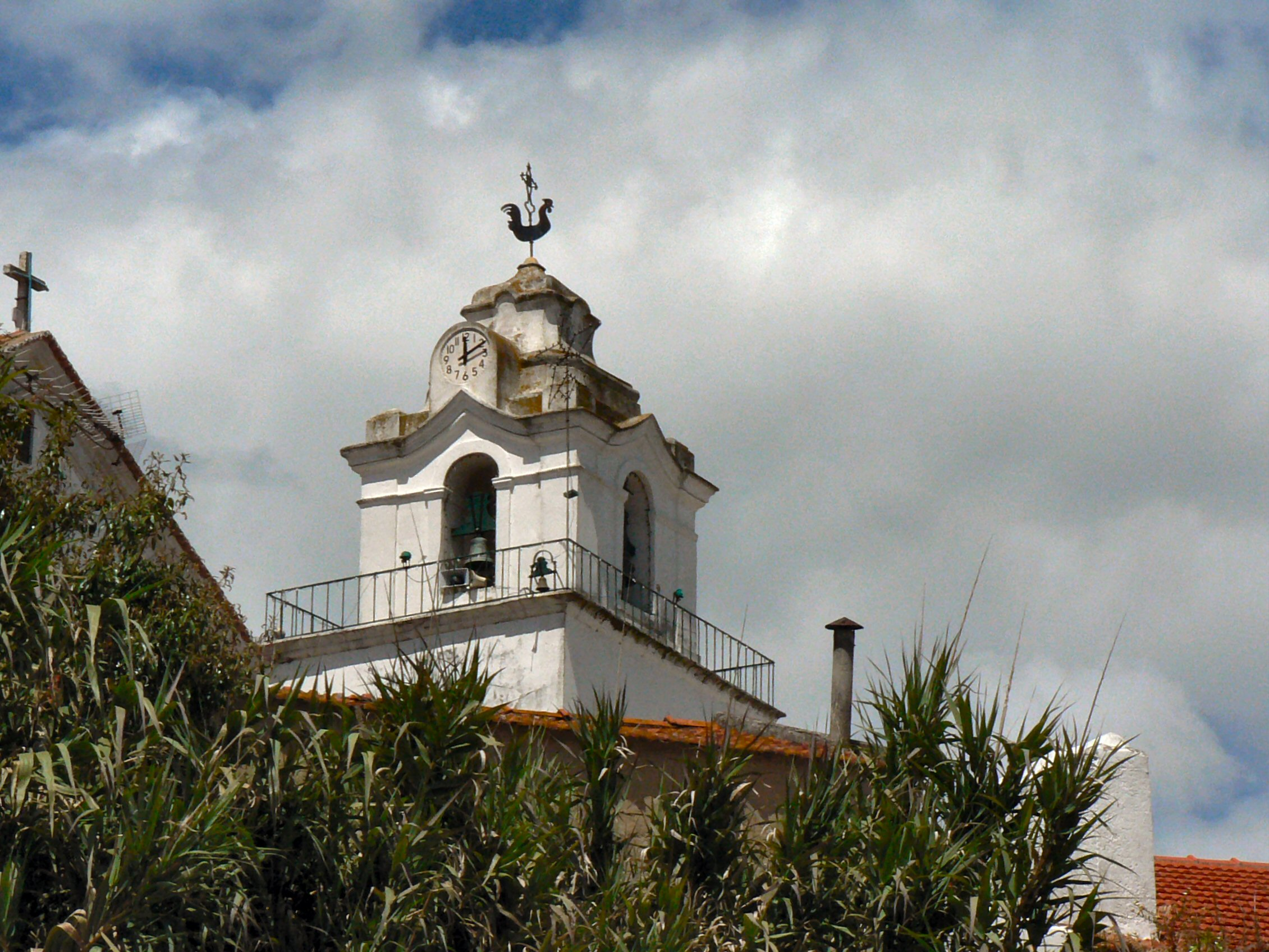 Igreja Matriz de Unhos - Torre sineira